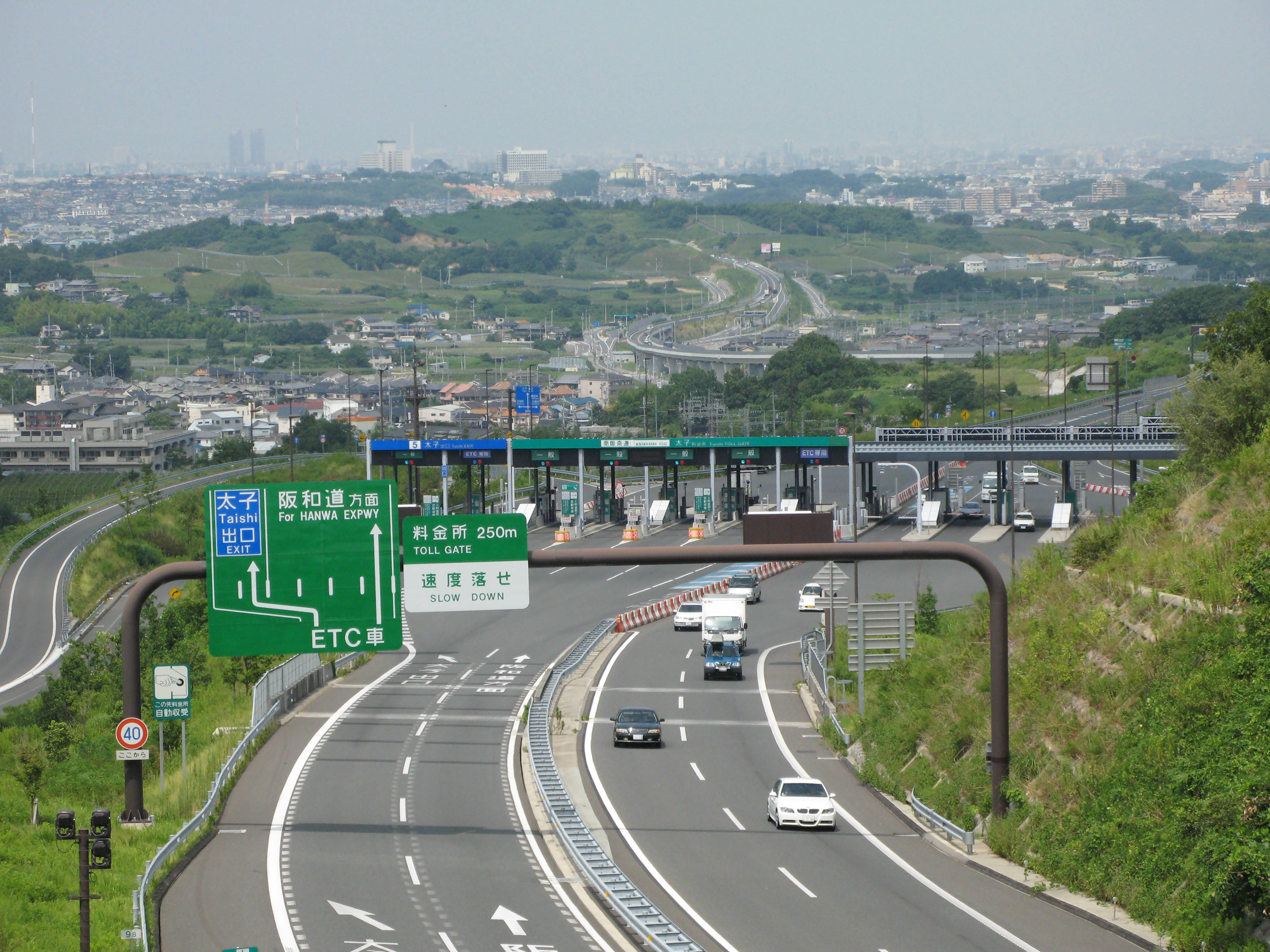 Taishi IC, Minamihanna Road, Japan